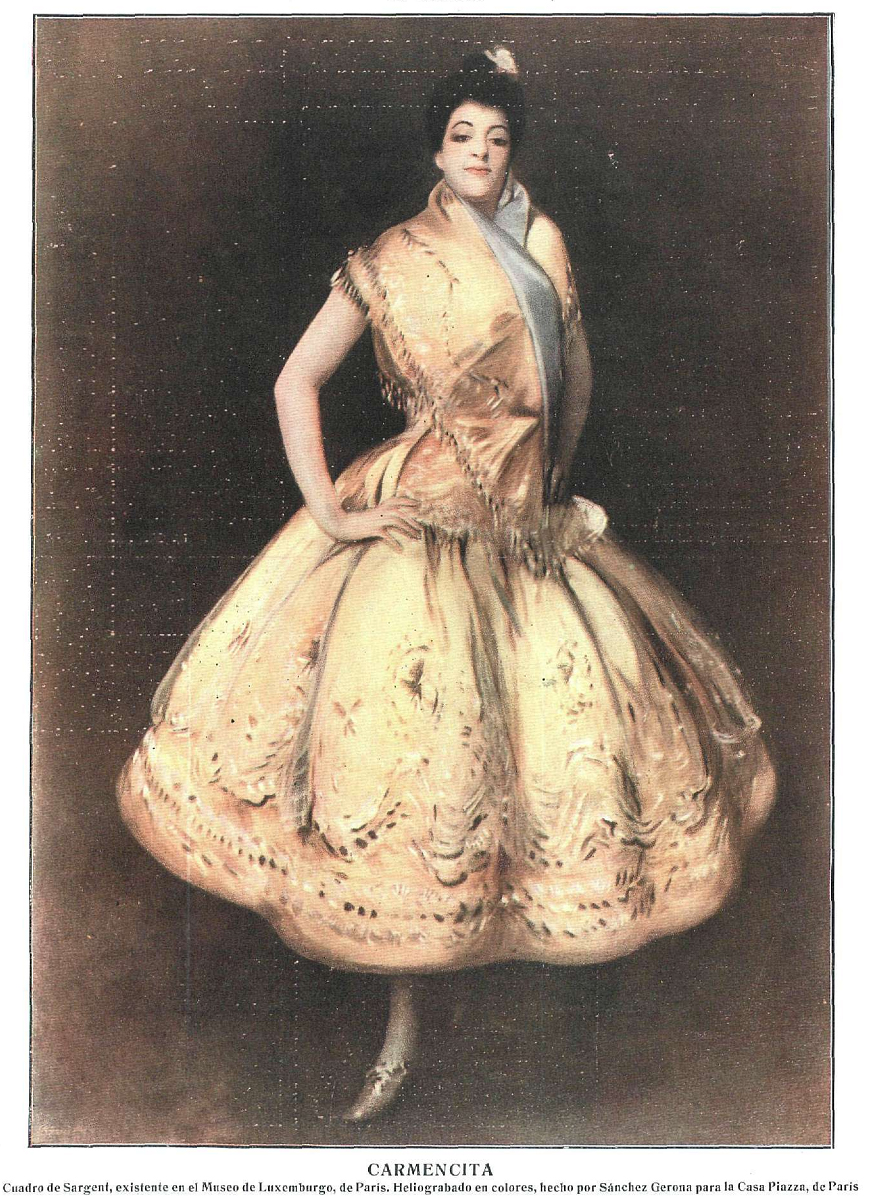 Carmencita, «cuadro de Sargent (...). Heliograbado en colores, hecho por Sánchez Gerona para la Casa Piazza, de París», obra publicada en la revista española La Esfera.